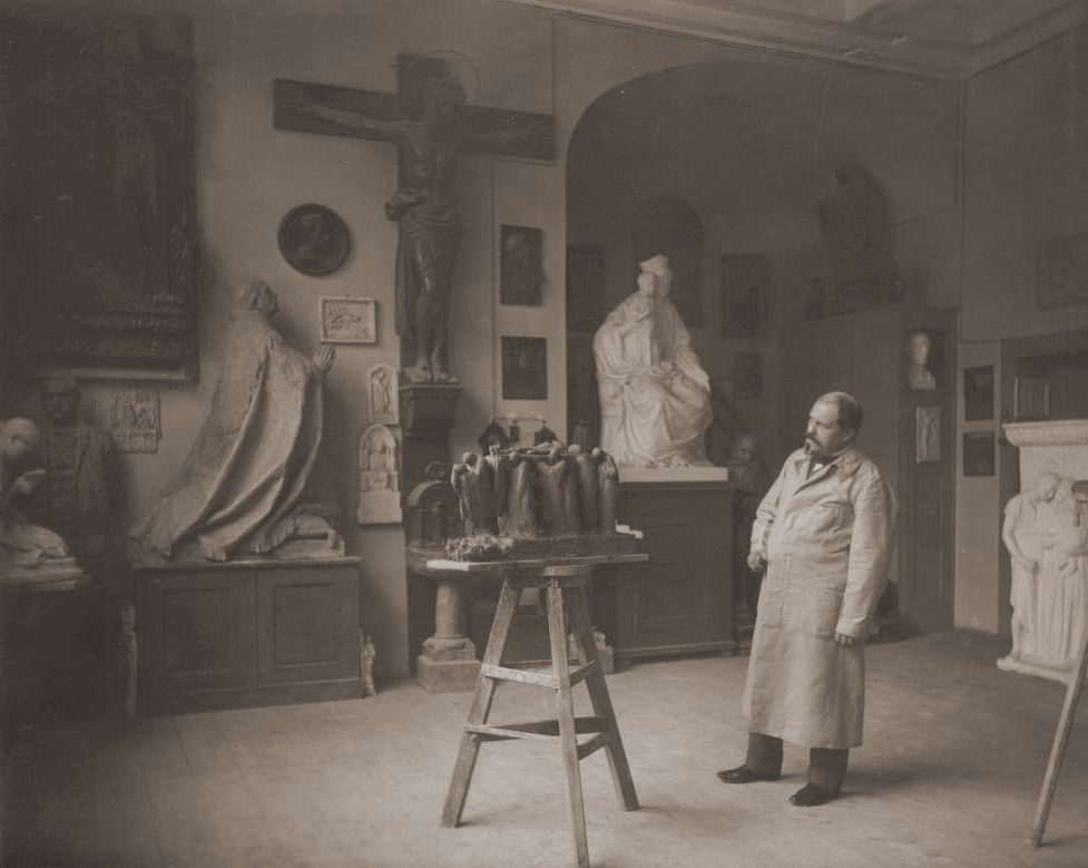 Georg Busch in seinem Atelier (1912); von links nach rechts sind folgende Modelle von Werken zu sehen: Die Modelle vom betenden Mädchen (1891), vom Epitaph von Erzbischof von Stein, München (1911), vom Bischof Haffner, Mainz (1902), die Replik des Triumphkreuzes von Eichstätt (1897), der Entwurf zur Freiplastik Grabtragung Christi (1912), das Modell von der Madonna am Grab Müller-Netscher in Eltville (1904) und rechts vom Familienglück-Relief am Friedensdenkmal in Steinheim (1911).